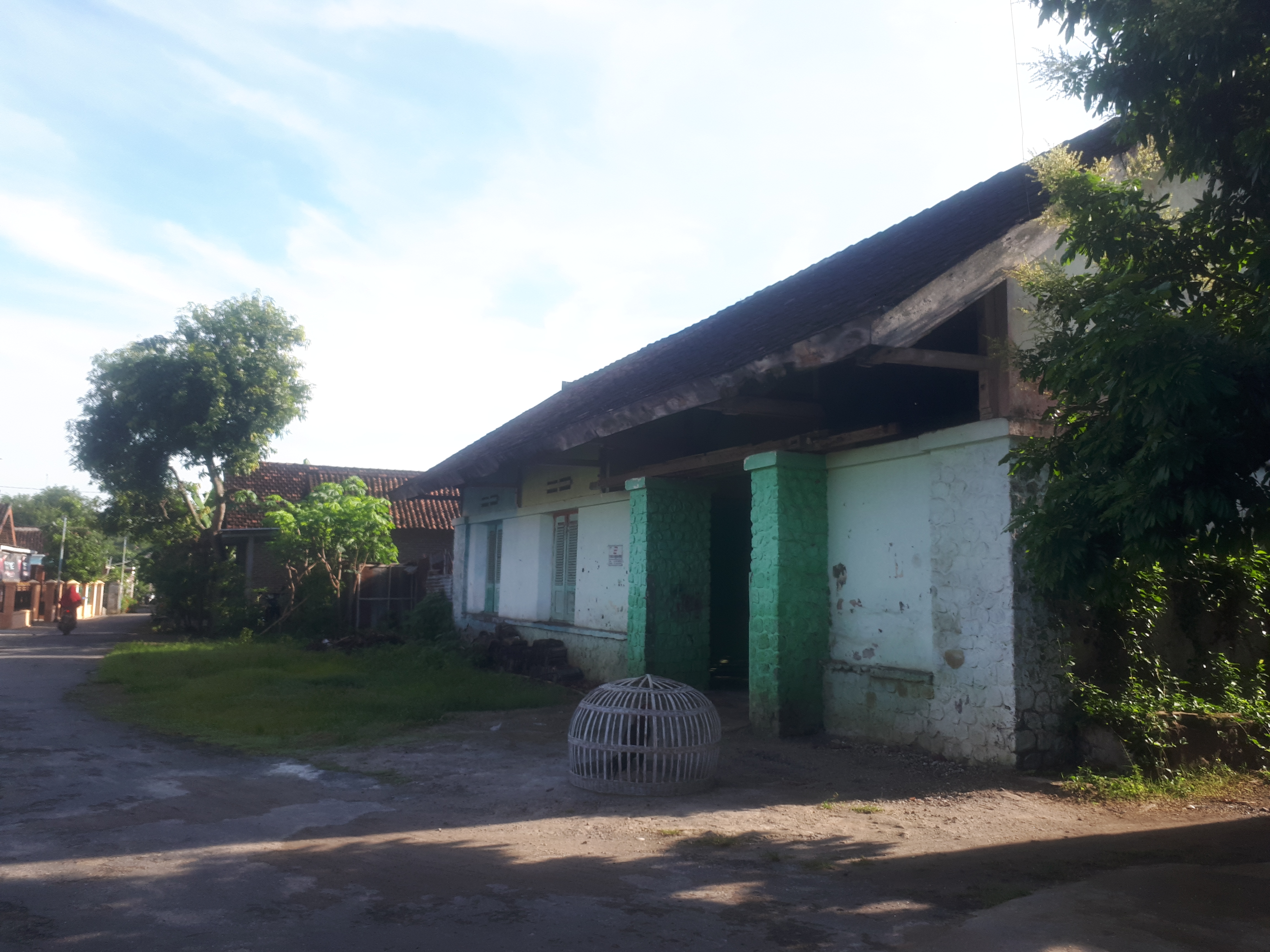 Tampak luar bangunan Stasiun Kanigoro sisi barat, salah satu stasiun nonaktif di Kabupaten Madiun, bersebelahan dengan Pabrik Gula Kanigoro